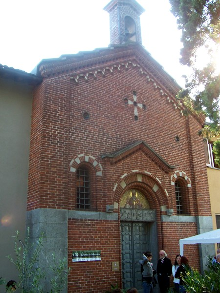 Brugherio - Chiesa di S. Ambrogio